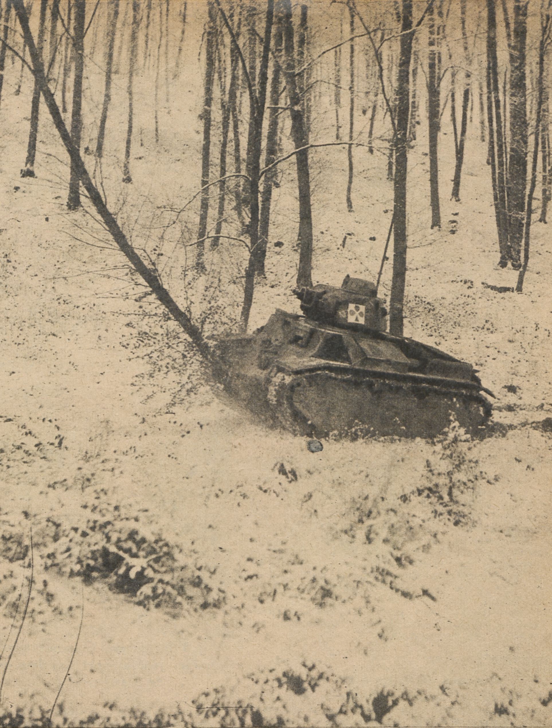 LES CHARS D'ASSAUT sont parfois conciliants et routiniers, et ils suivent alors docilement les voies et les chemins, même forestiers, dont leurs chenilles s'accommodent fort bien ; mais la neige ne les empêche pas de couper, s'il le faut, à travers champs et bois, et un arbre, même robuste, ne constitue pas un obstacle suffisant pour détourner le char de sa direction. Janvier 1940. [D2 Neerwinden 1/19e BCC]